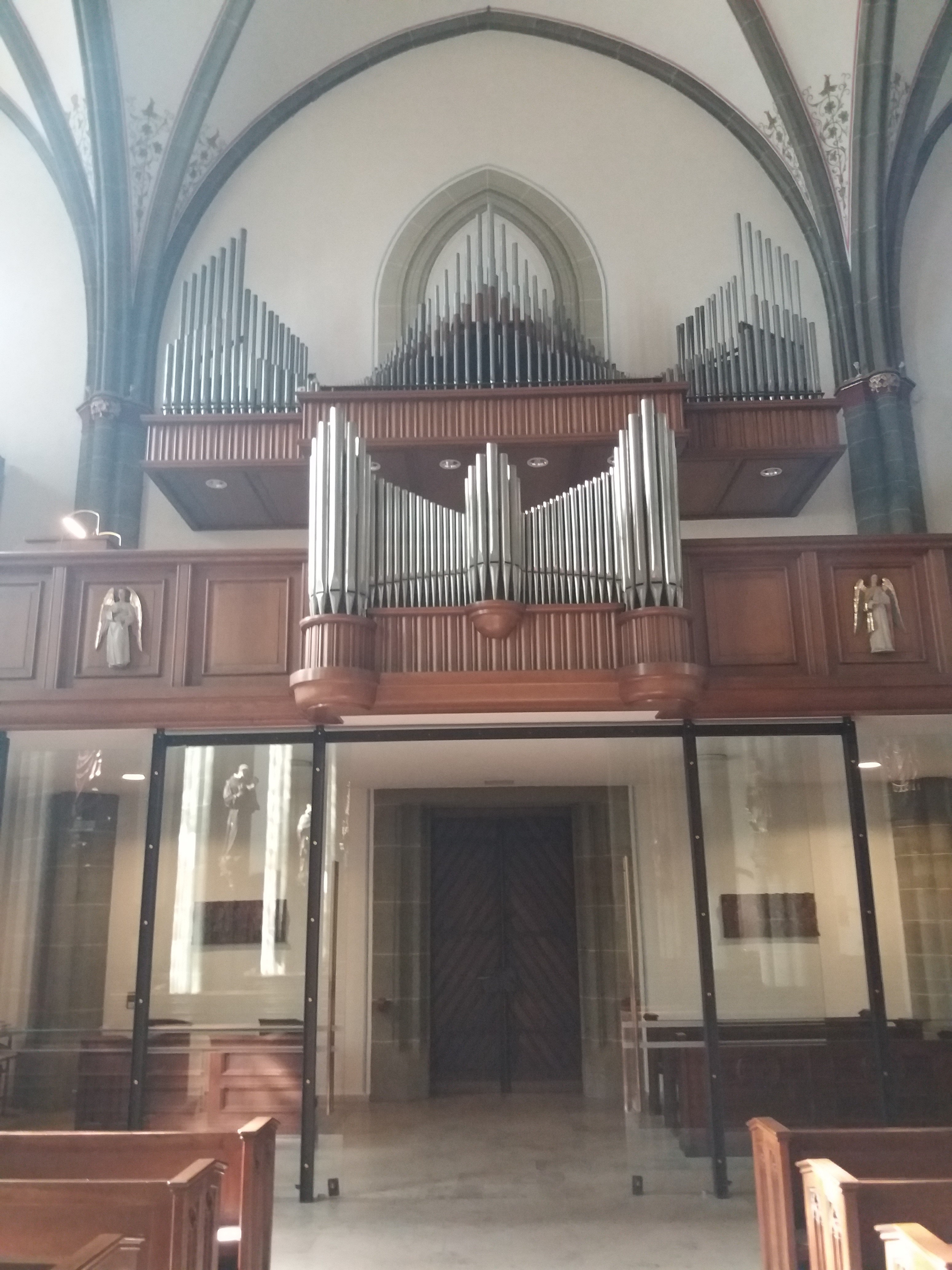 Orgel St. Pankratius Warstein